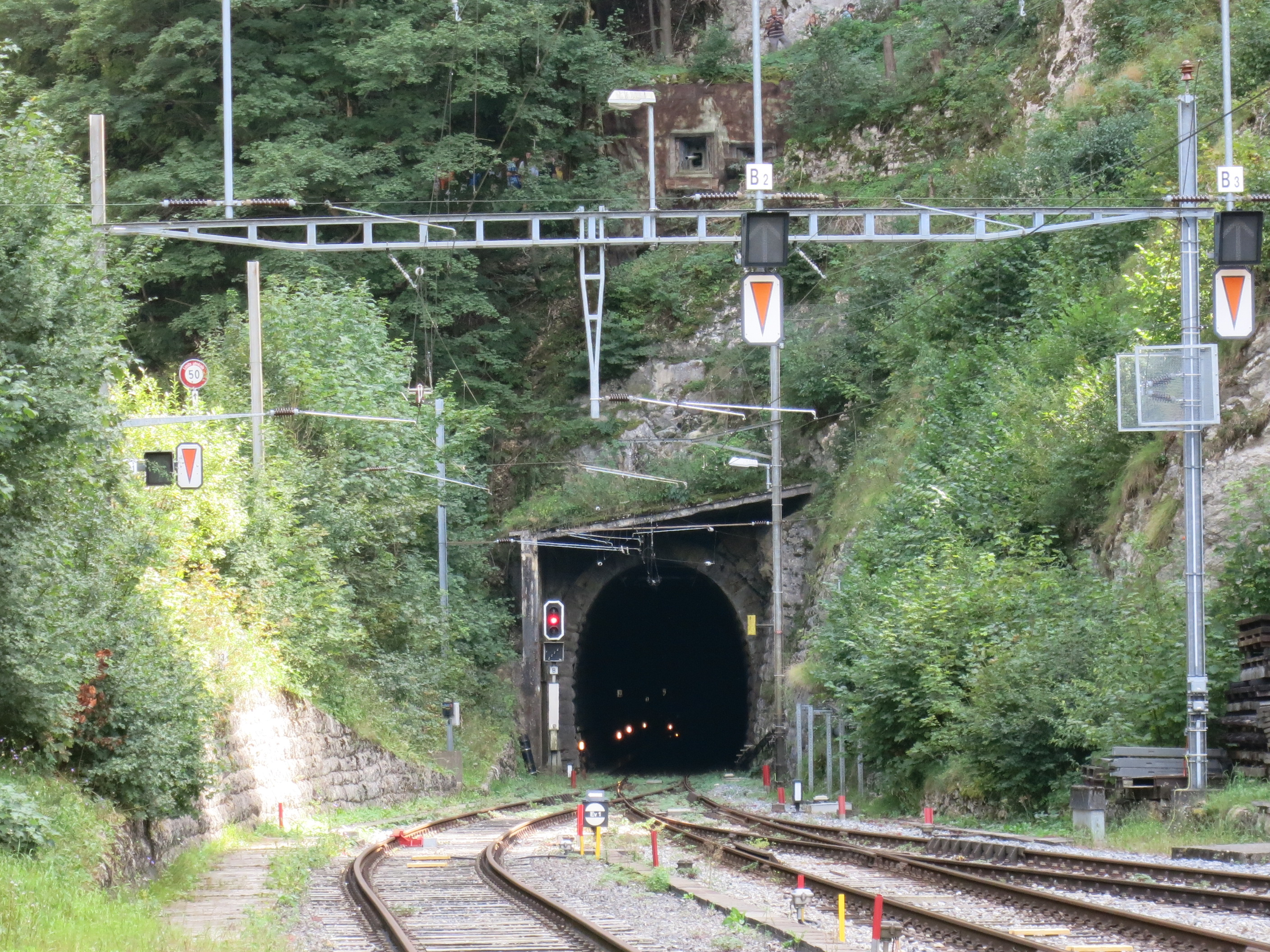 Sperrstelle Gänsbrunnen SO, Schweiz